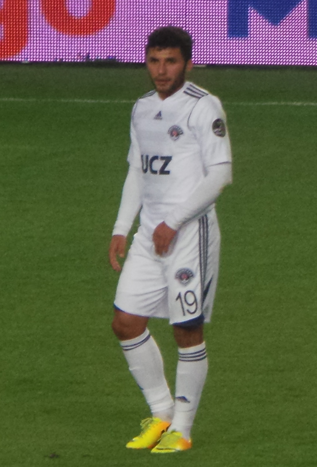 Tabaré Viudez